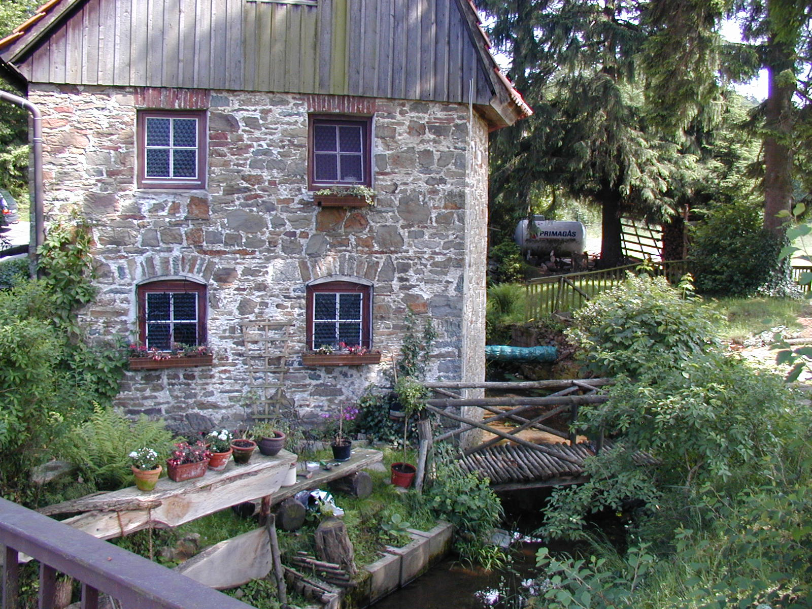 Löher Mühle in Halver/ Löher mill in Halver